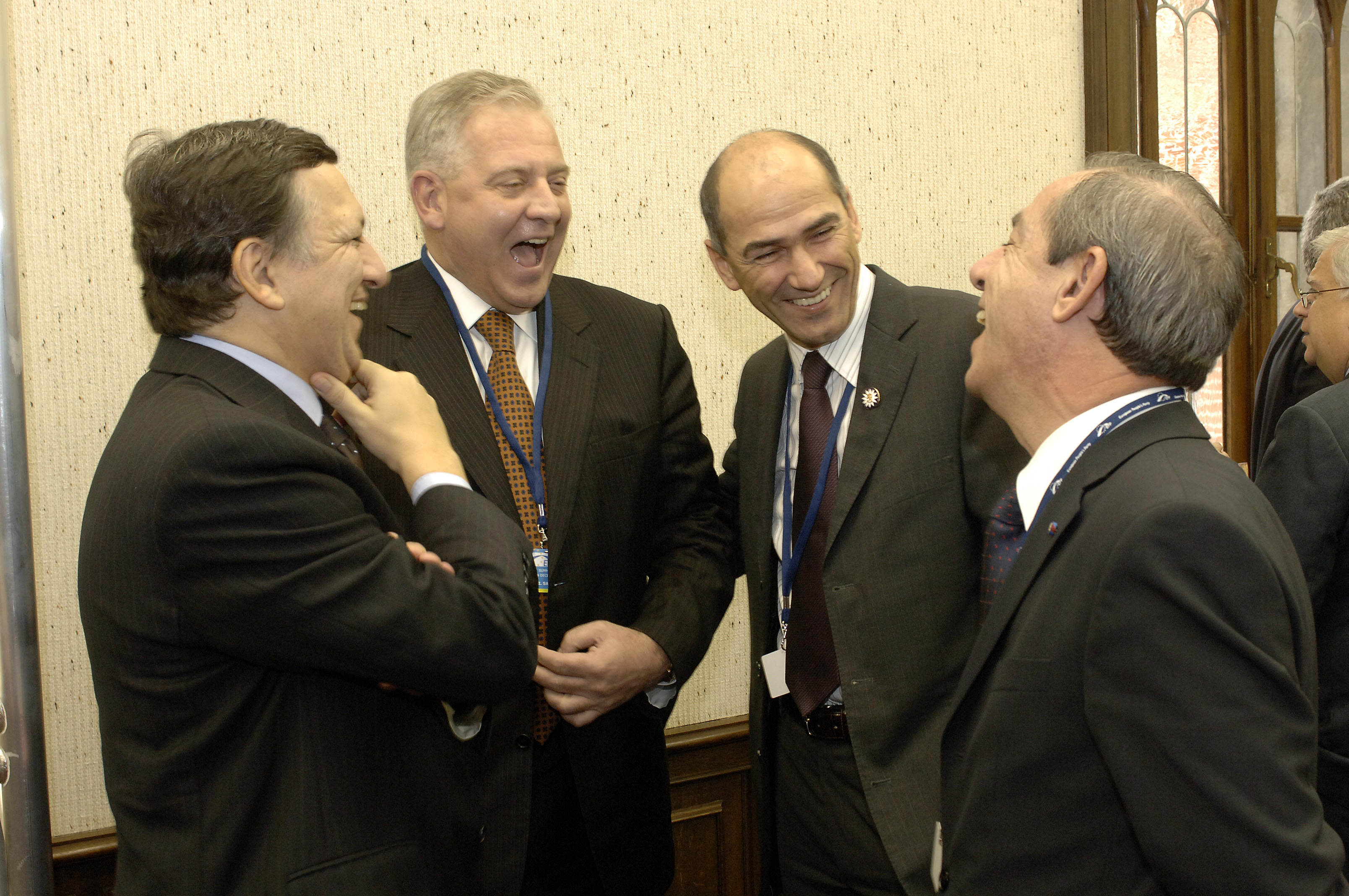 EPP Summit 14 December 2006